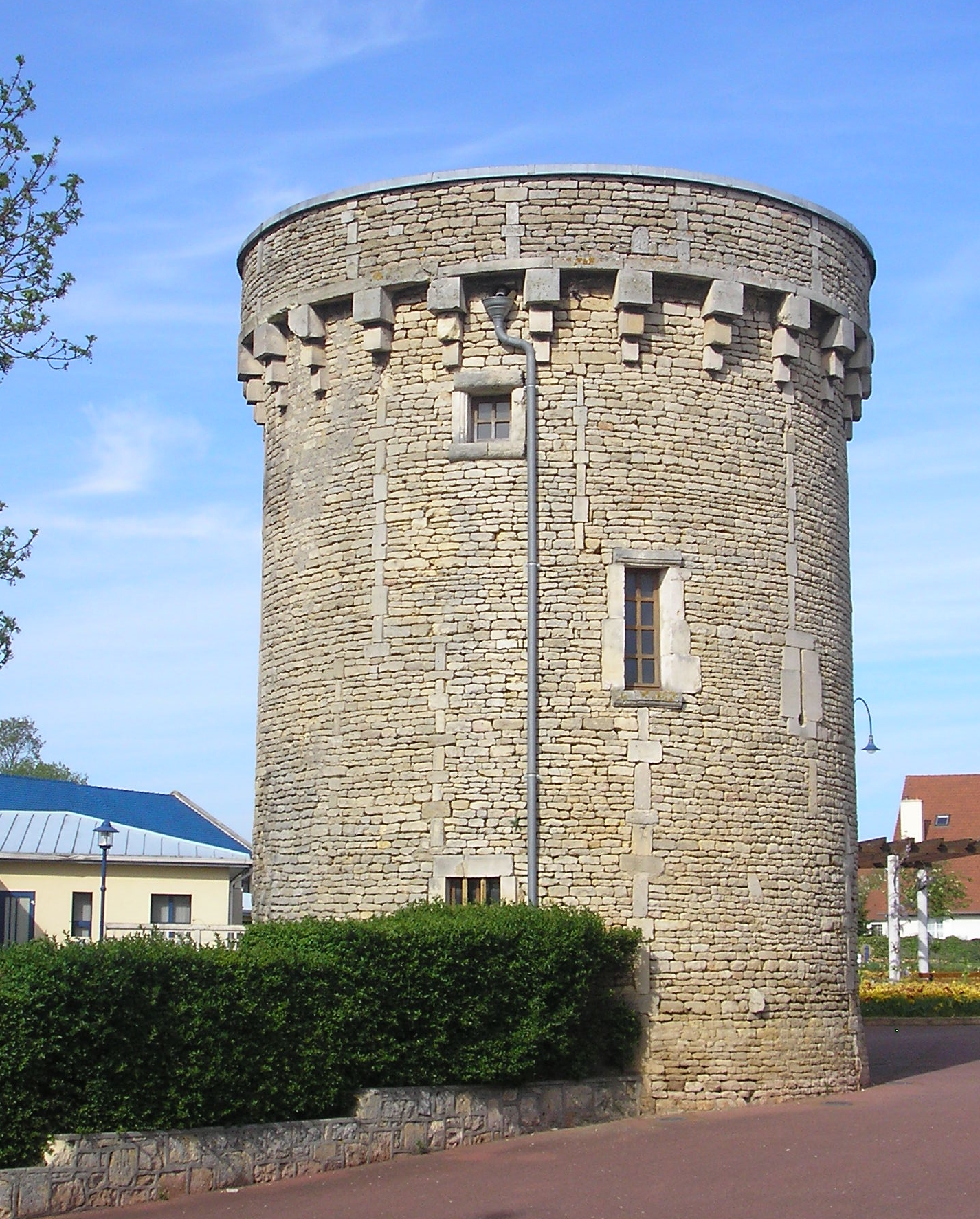 Colombelles (Normandie, France). La tour.